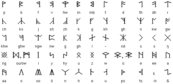 кирт. Властелин колец